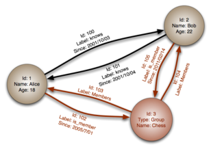 Монгол: График өгөгдлийн сан зангилаануудыг, шинж чанар болон ирмэг ашиглах.